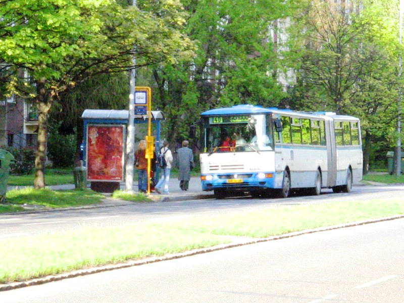 Kloubový autobus Karosa v Ostravě-Porubě/Public transport in Ostrava, Czech republic, EU